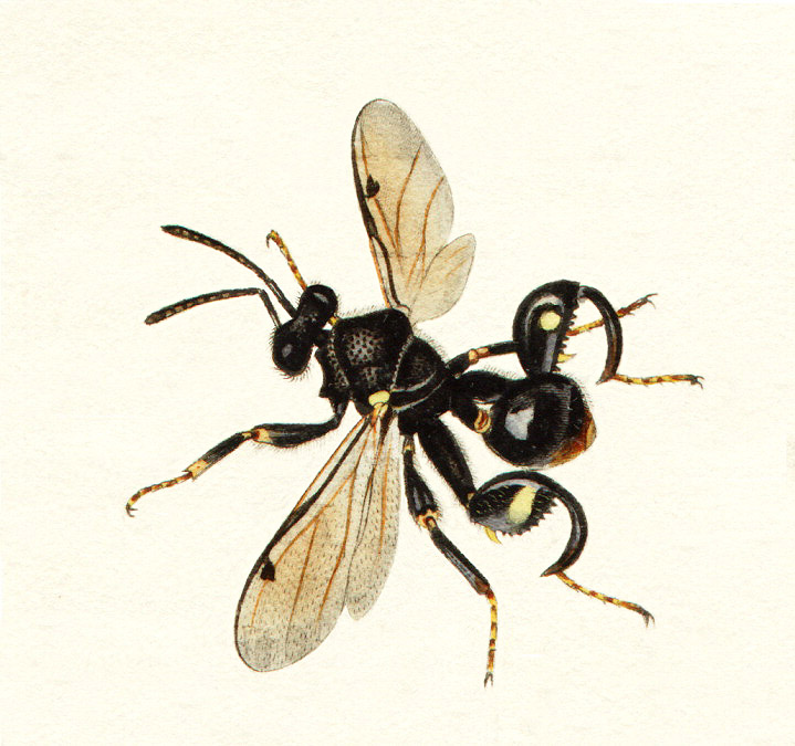 Chalcis